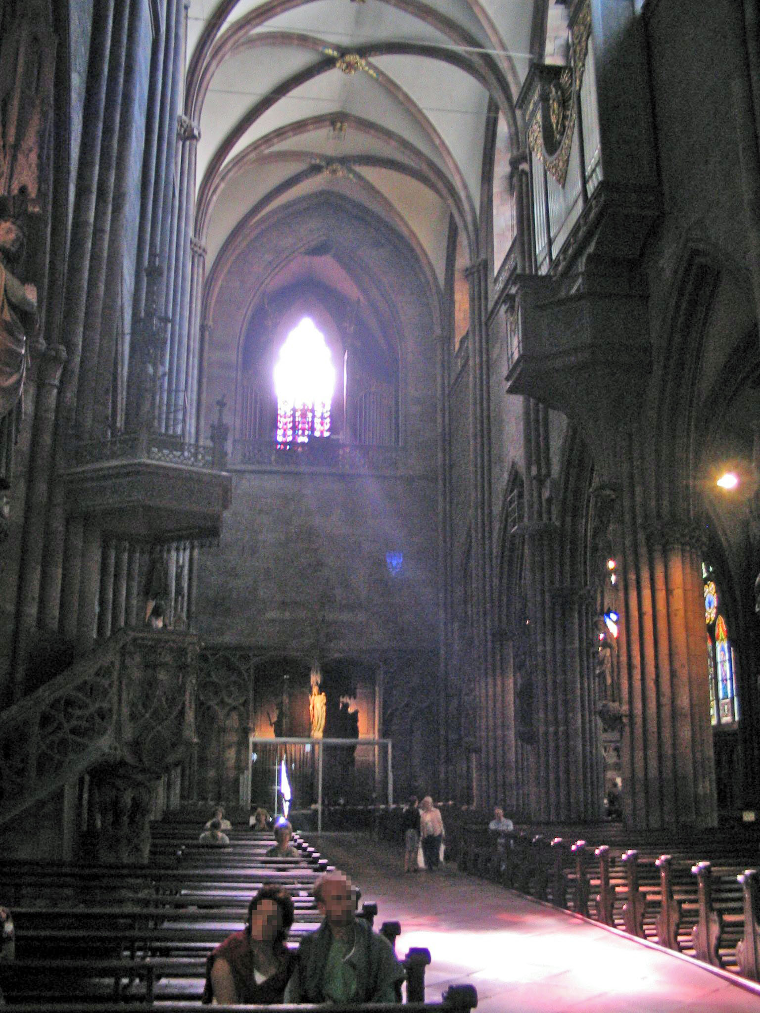 Das Freiburger Münster